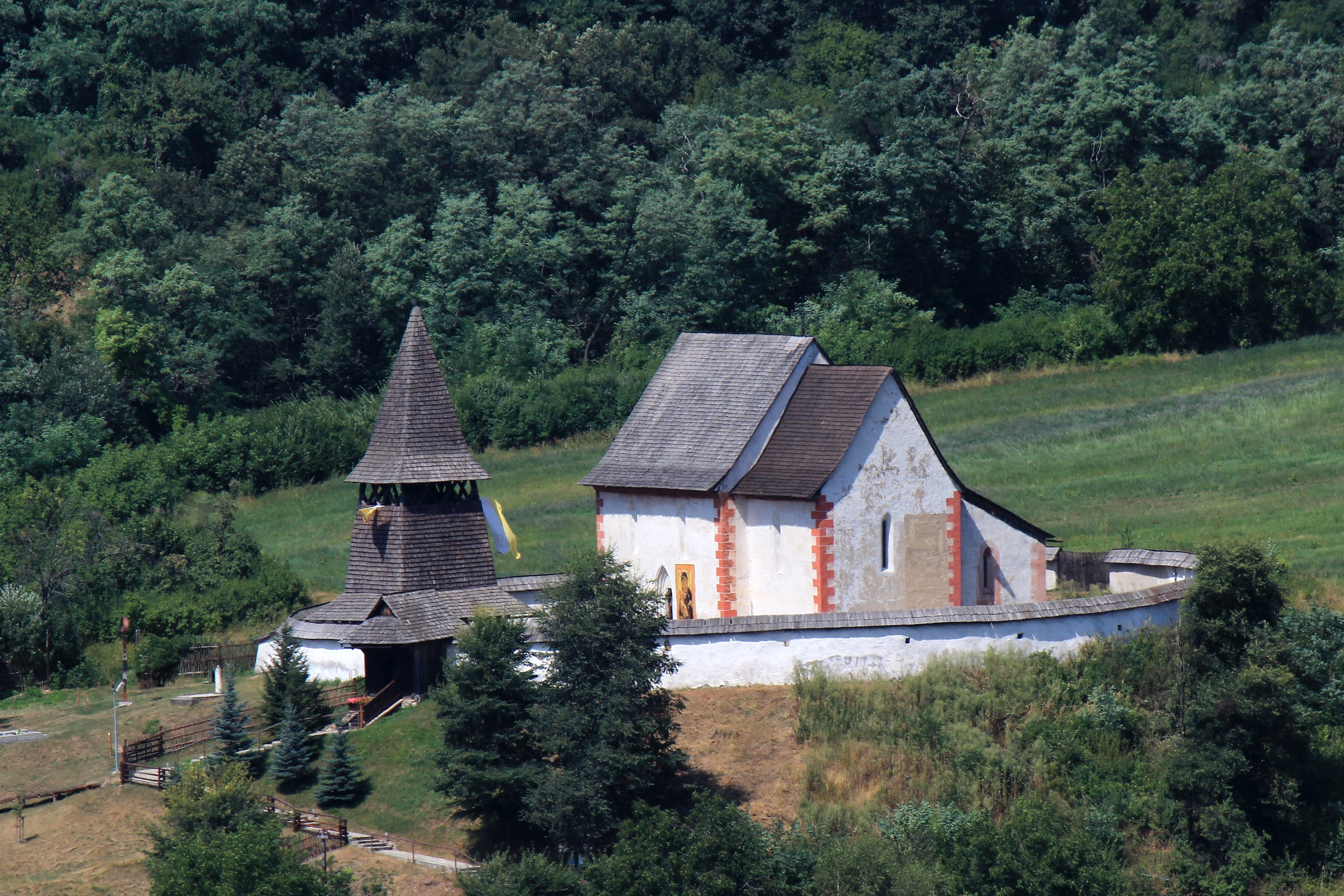 Gotický kostol sv. Martina v Čeríne